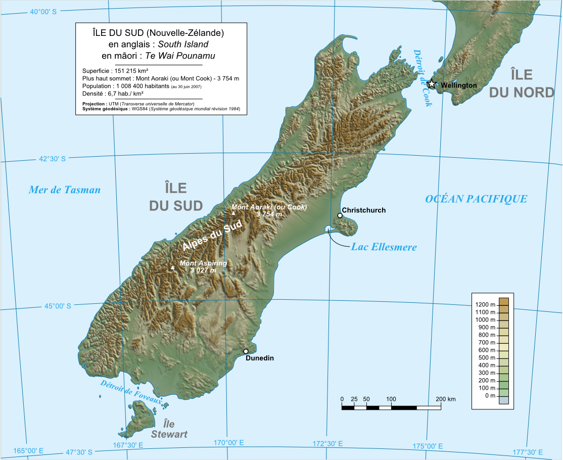 Sujet : Carte physique de l'île du Sud en Nouvelle-Zélande / Map of South Island in New Zealand. Origine des données d'altitude : site FTP SRTM30 (précision de trente secondes d'arc) du SRTM (Shuttle Radar Topography Mission) (domaine public) de la NASA. Visualisation des données d'altitude : Logiciel dlgv32 Pro (version allégée de Global Mapper 9) de l'USGS. Projection : UTM. Système géodésique : WGS84. Logiciels de dessin utilisés : Fond de la carte : . Légendes, lignes et symboles : Inkspace. Format : PNG à partir d'une carte au format SVG Méthode : Carte réalisée en s'inspirant des didactitiels de Sting.